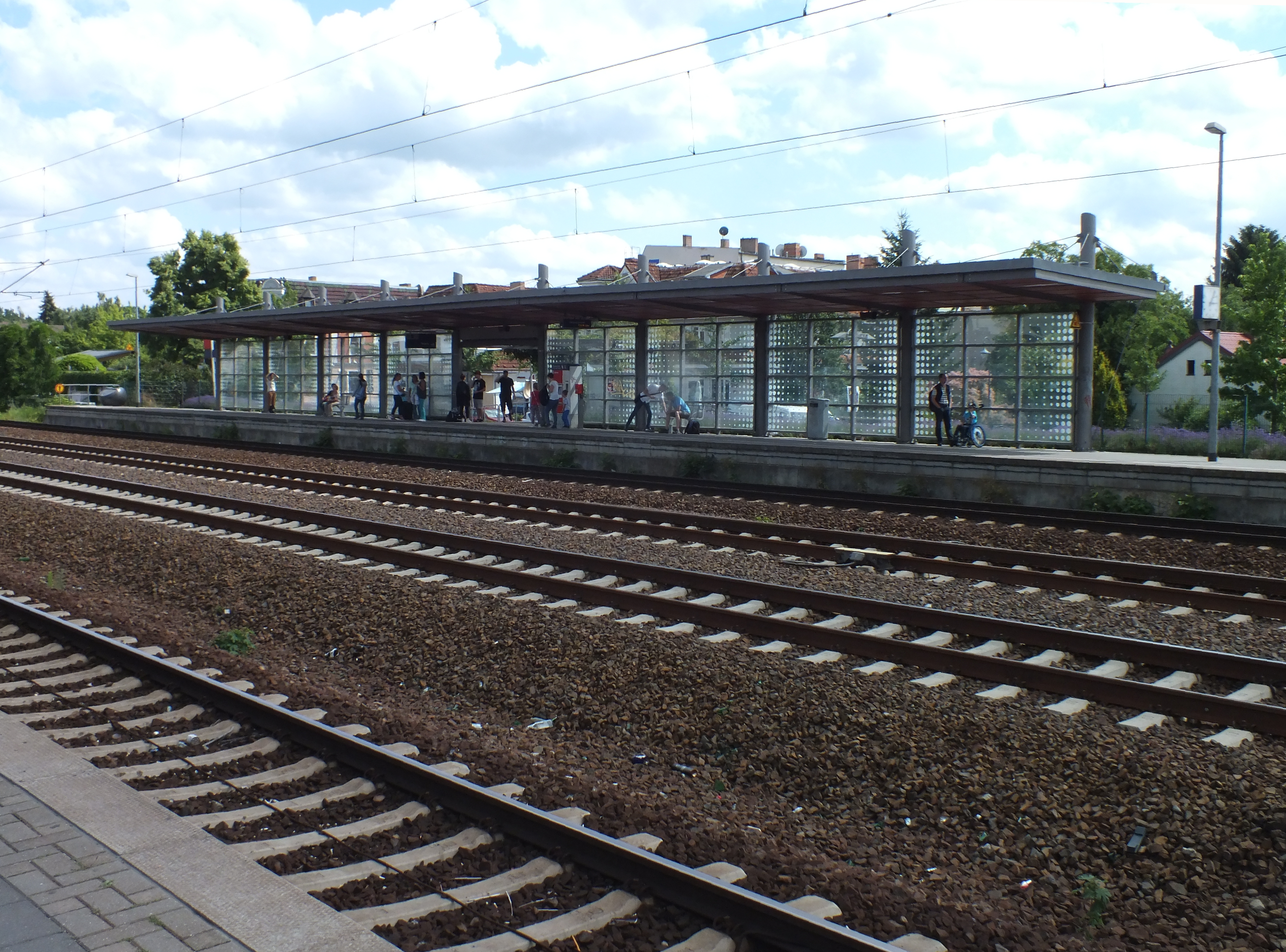 Bahnhof Falkensee, Bahnsteig Richtung Berlin